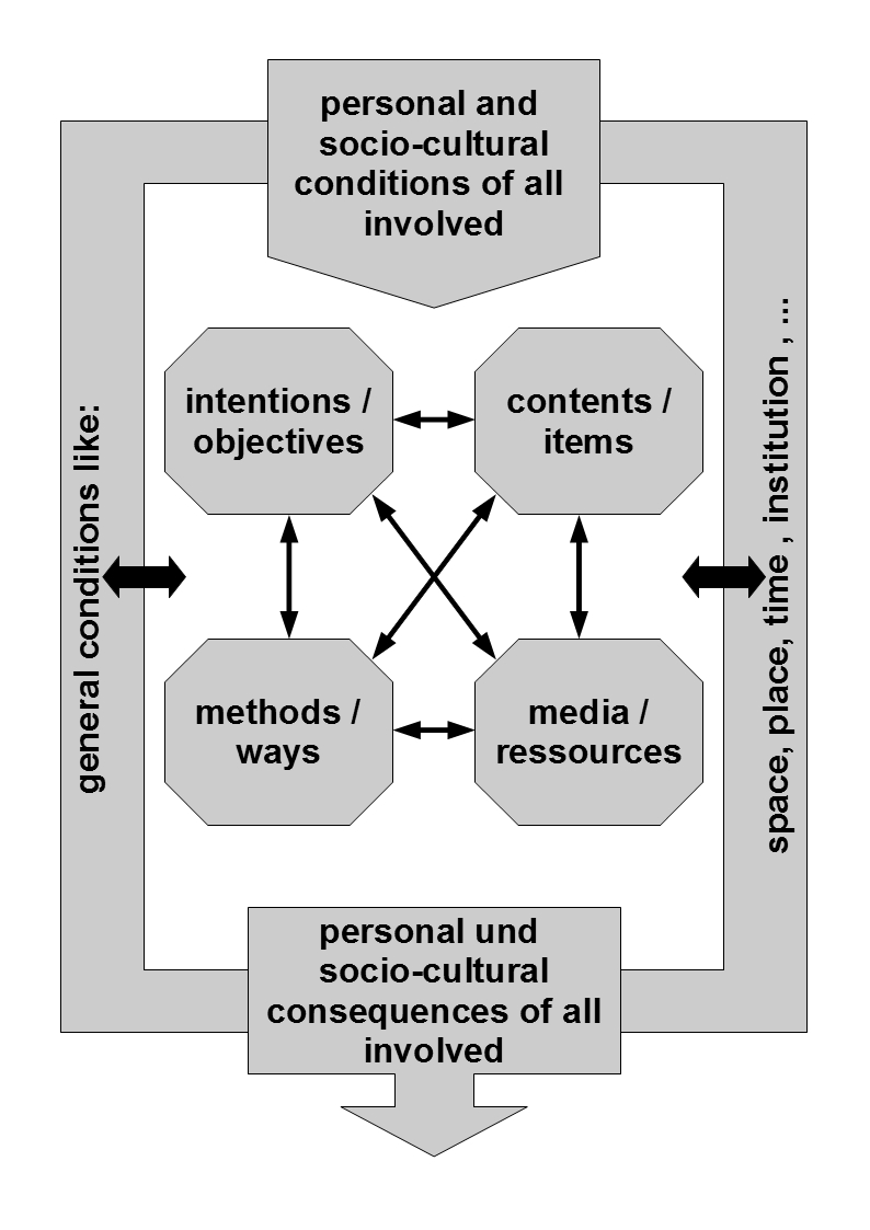 Berliner Modell als Werkzeug der Planung von Tätigkeits- und Freizeitangeboten für Patienten- oder Bewohnergruppen [1]